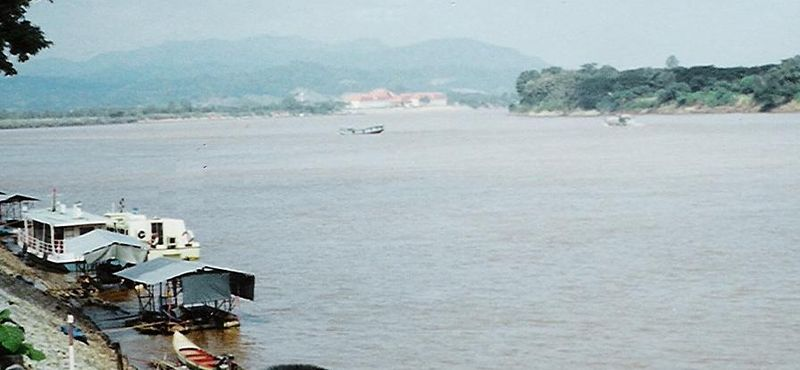 משולש הזהב. זכויות היוצרים שייכות לי.